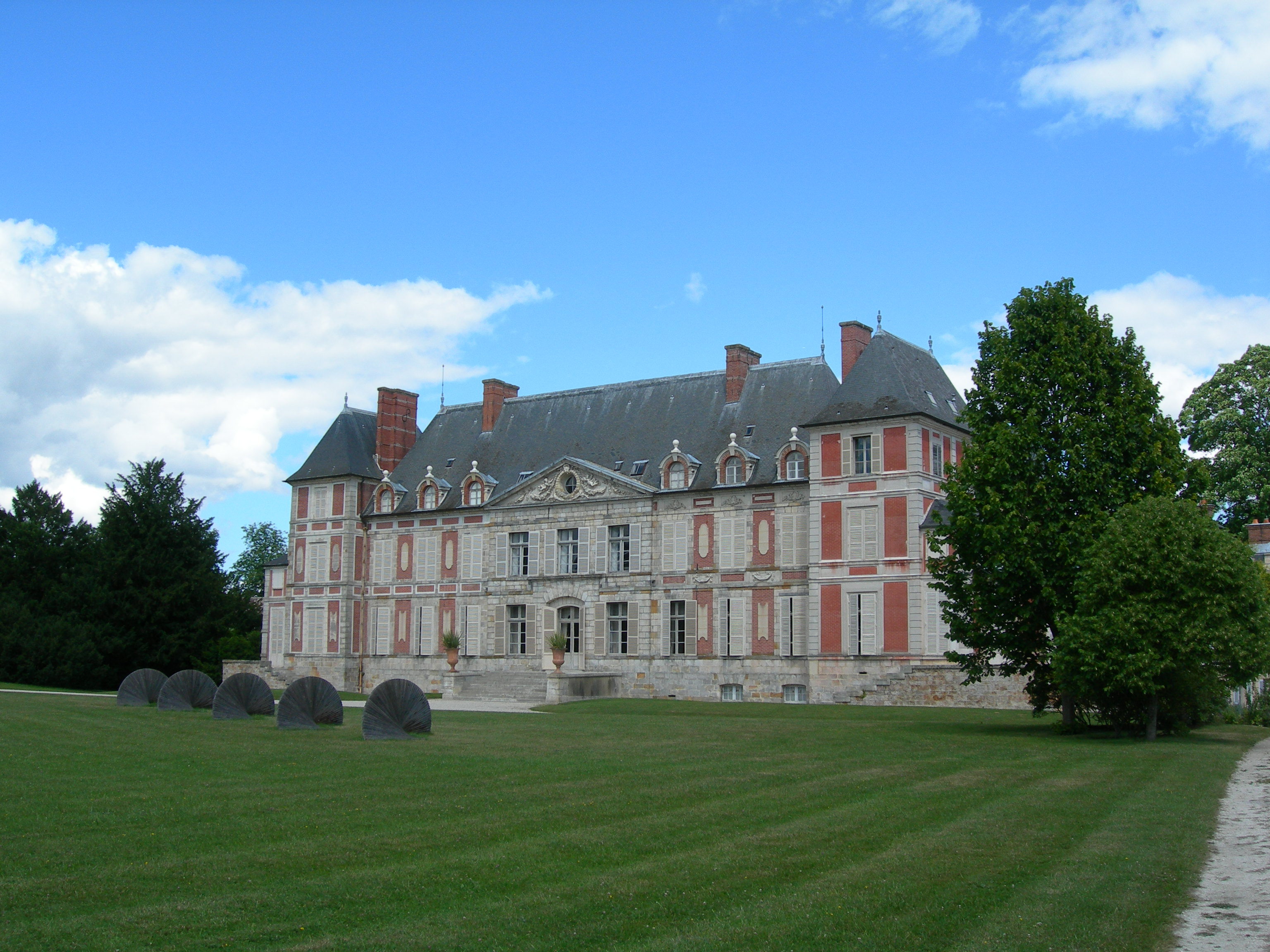 Château de Courson. (département de l'Essonne, région Île-de-France).